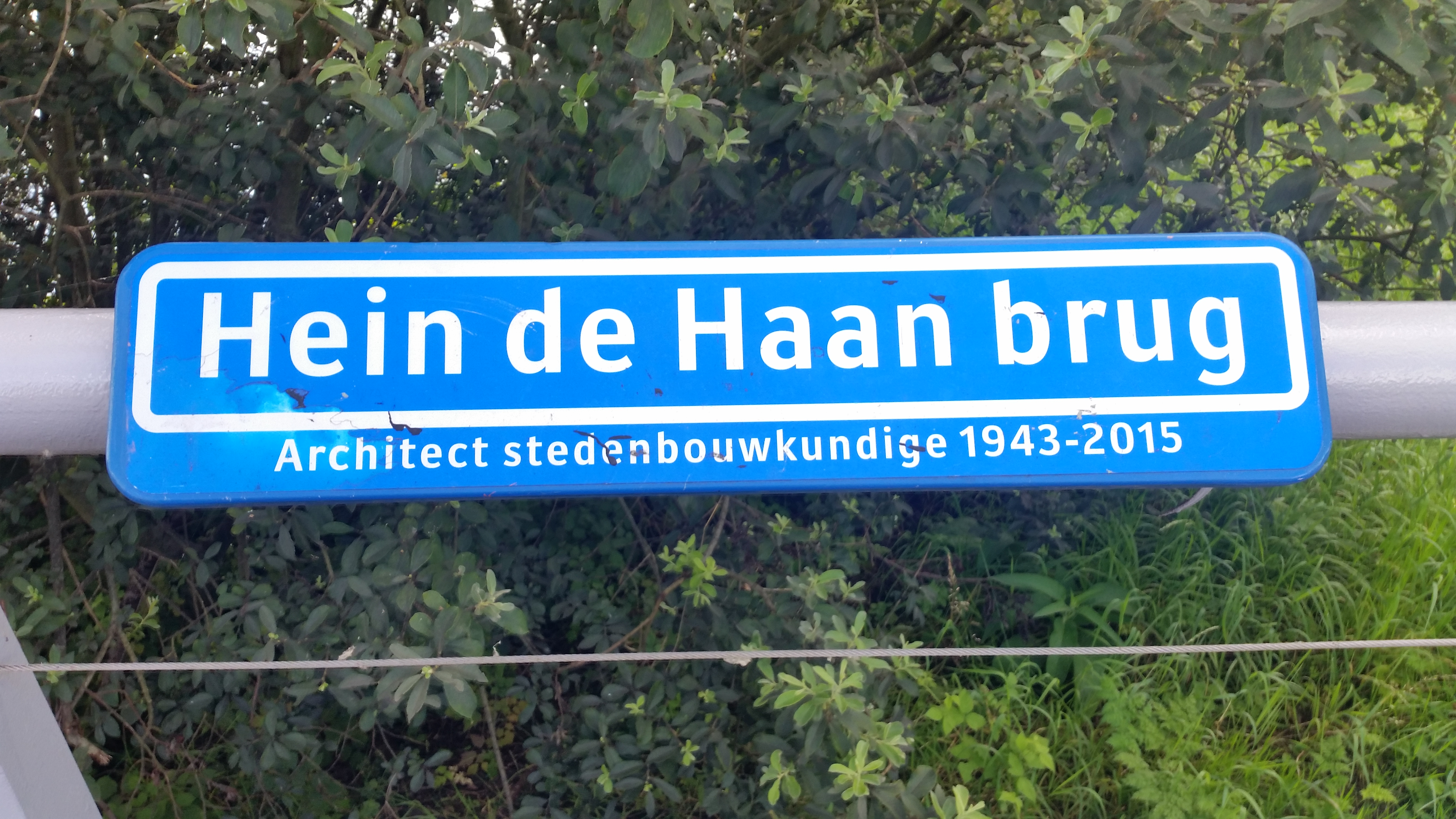 Impressie van brug 2037 Hein de Haanbrug tussen IJburg en Diemerzeedijk (juli 2020)